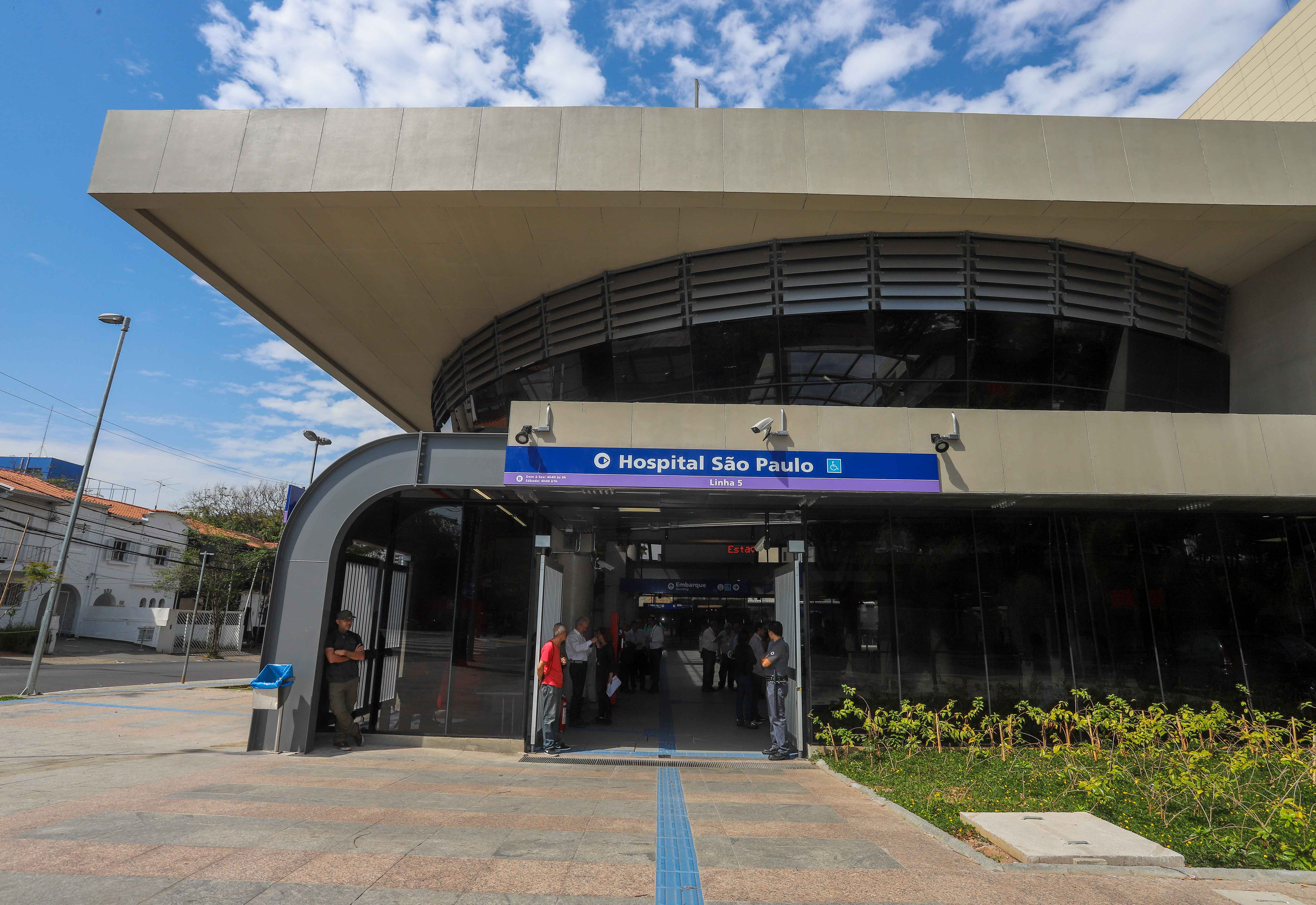 O governador do Estado de São Paulo, Márcio França, participa de visita técnica às novas estações da Linha 5-Lilás do Metrô: Hospital São Paulo; Chácara Klabin e Santa Cruz. Local: São Paulo/SP Data: 26/09/2018 Foto: Governo do Estado de São Paulo